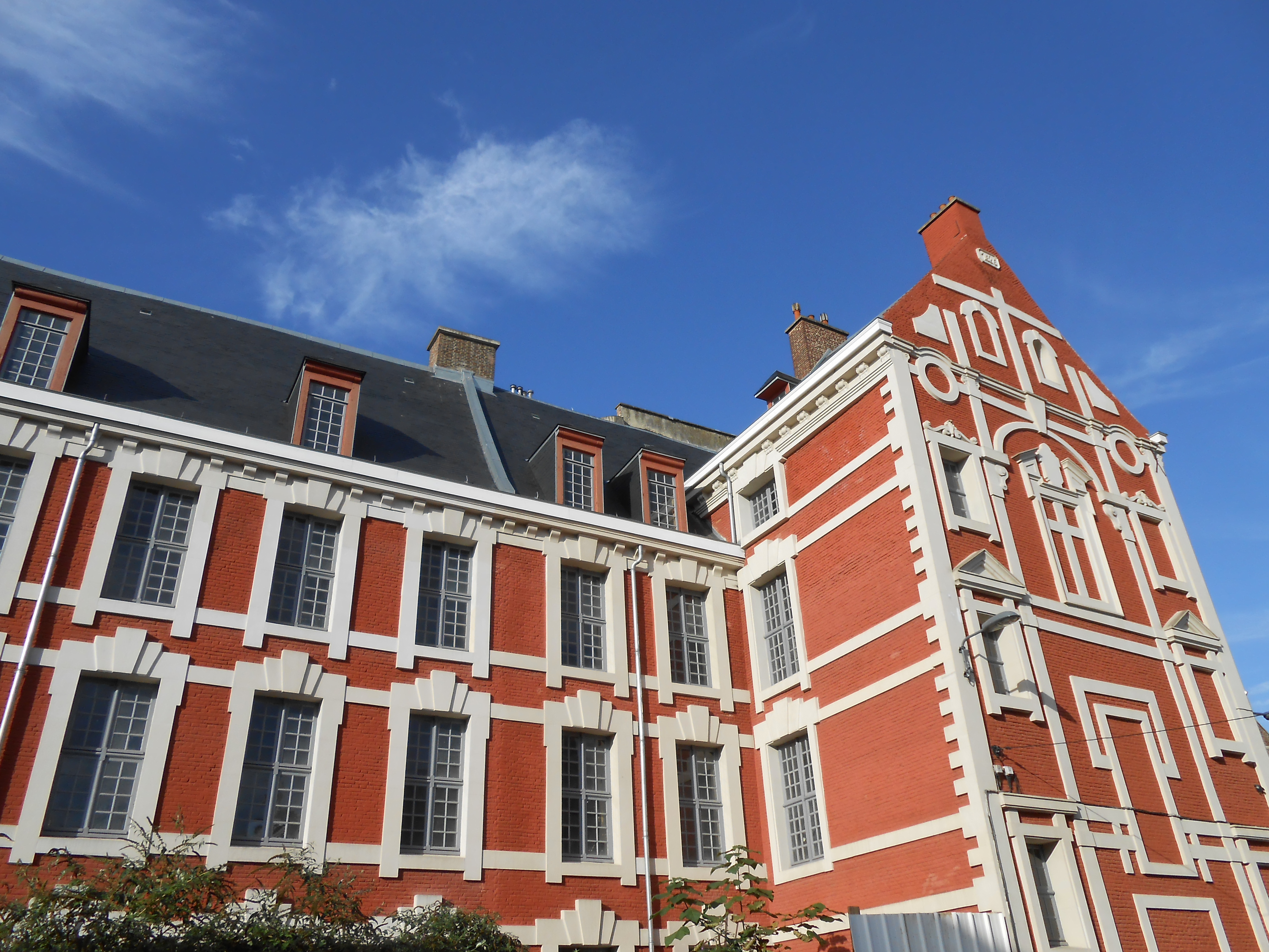 Hôtel du Lombard - 2, rue du Lombard F-59000 Lille France Architecte : Wenceslas Cobergher Affectations : Mont de piété (1626-1796) ; Dépôt des archives départementales du Nord (1803-1844) ; Amphithéâtre et laboratoire de la chaire municipale de chimie de Lille - Frédéric Kuhlmann (1824-1854) ; Ecole des arts industriels et des mines (1854-1871) ; Institut industriel agronomique et commercial du Nord de la France - IDN (1872-1875) ; Musée industriel et commercial (1856-1990).